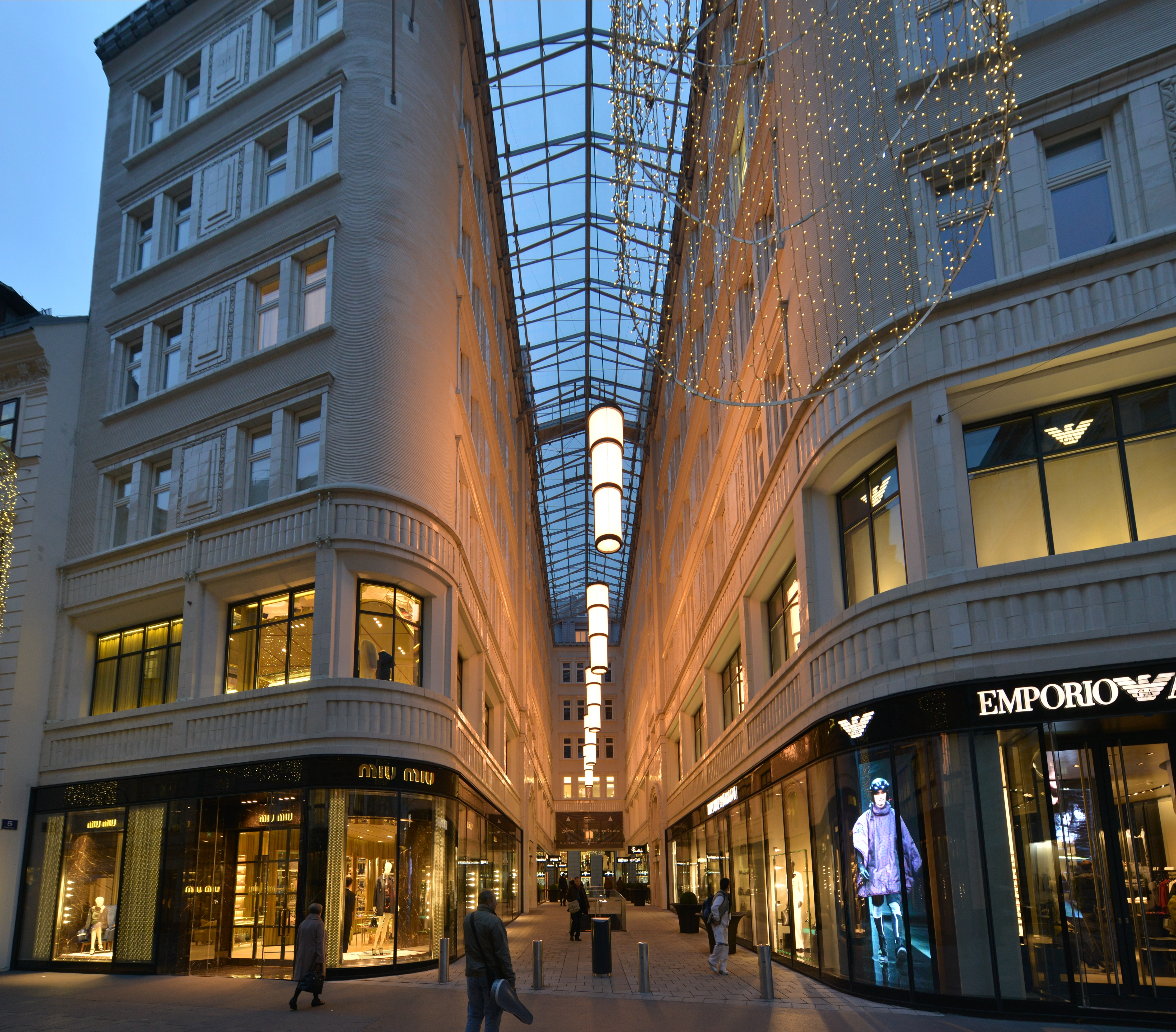 Wohn- und Geschäftshaus, Tuchlaubenhof an der Tuchlauben 7, 7A in Wien.